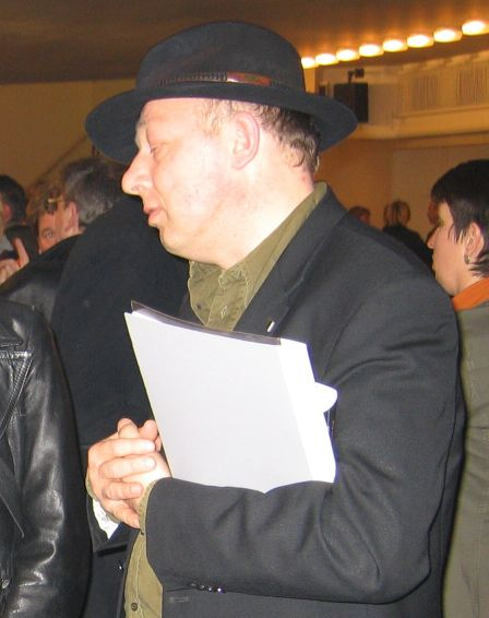 Hollow Skai bei einem Rio-Reiser-Abend im Kölner Schauspielhaus im Rahmen der Lit.Cologne